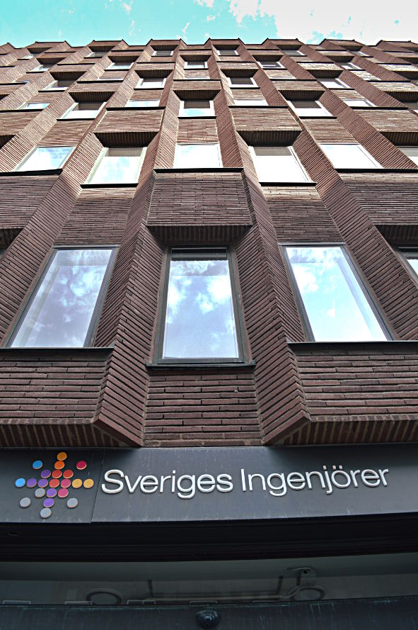 Huvudkontoret för fackförbundet Sveriges Ingenjörer finns i denna byggad, Malmskillnadsgatan, Stockholm.